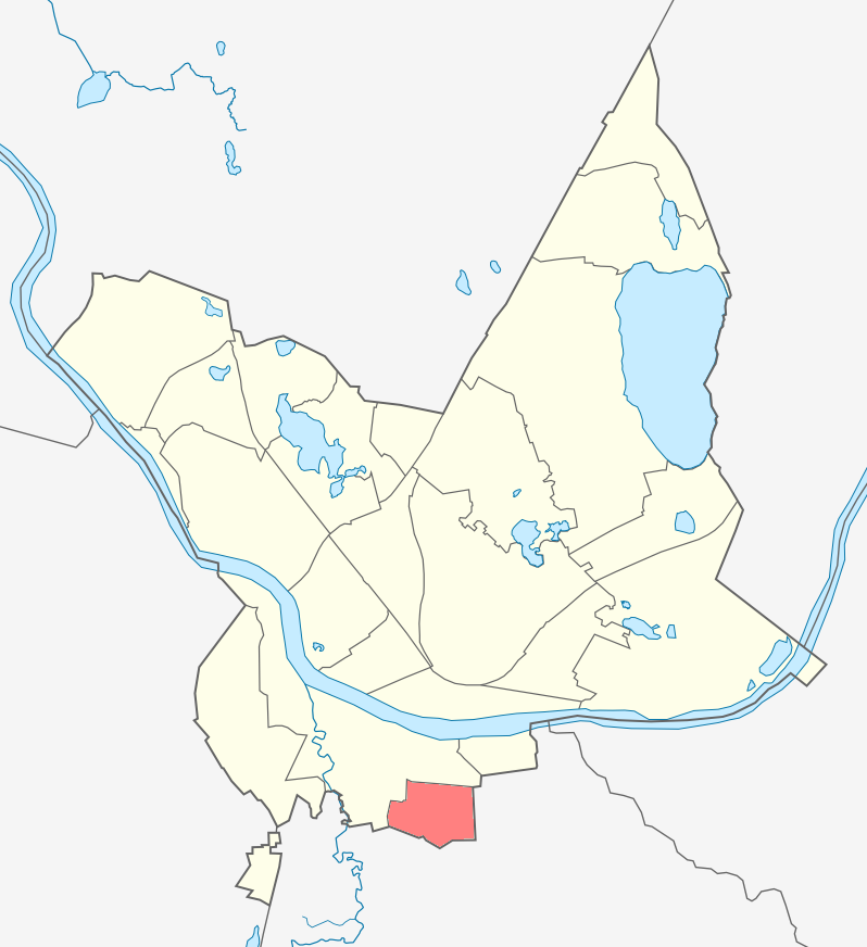 Микрорайон Лигинишки карте Даугавпилса.